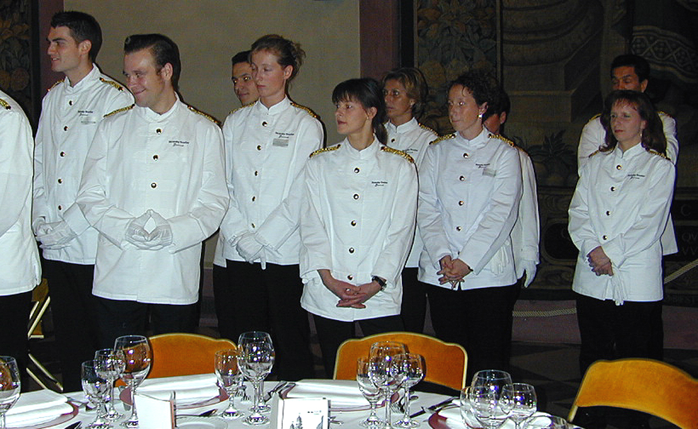 Personaleinweisung vor Veranstaltungsbeginn